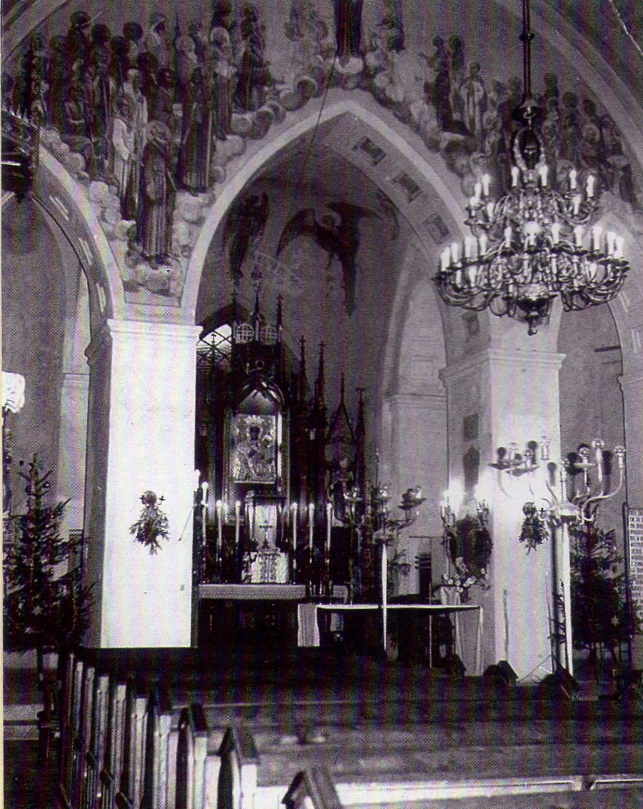 Prezbiterium w 1970 roku